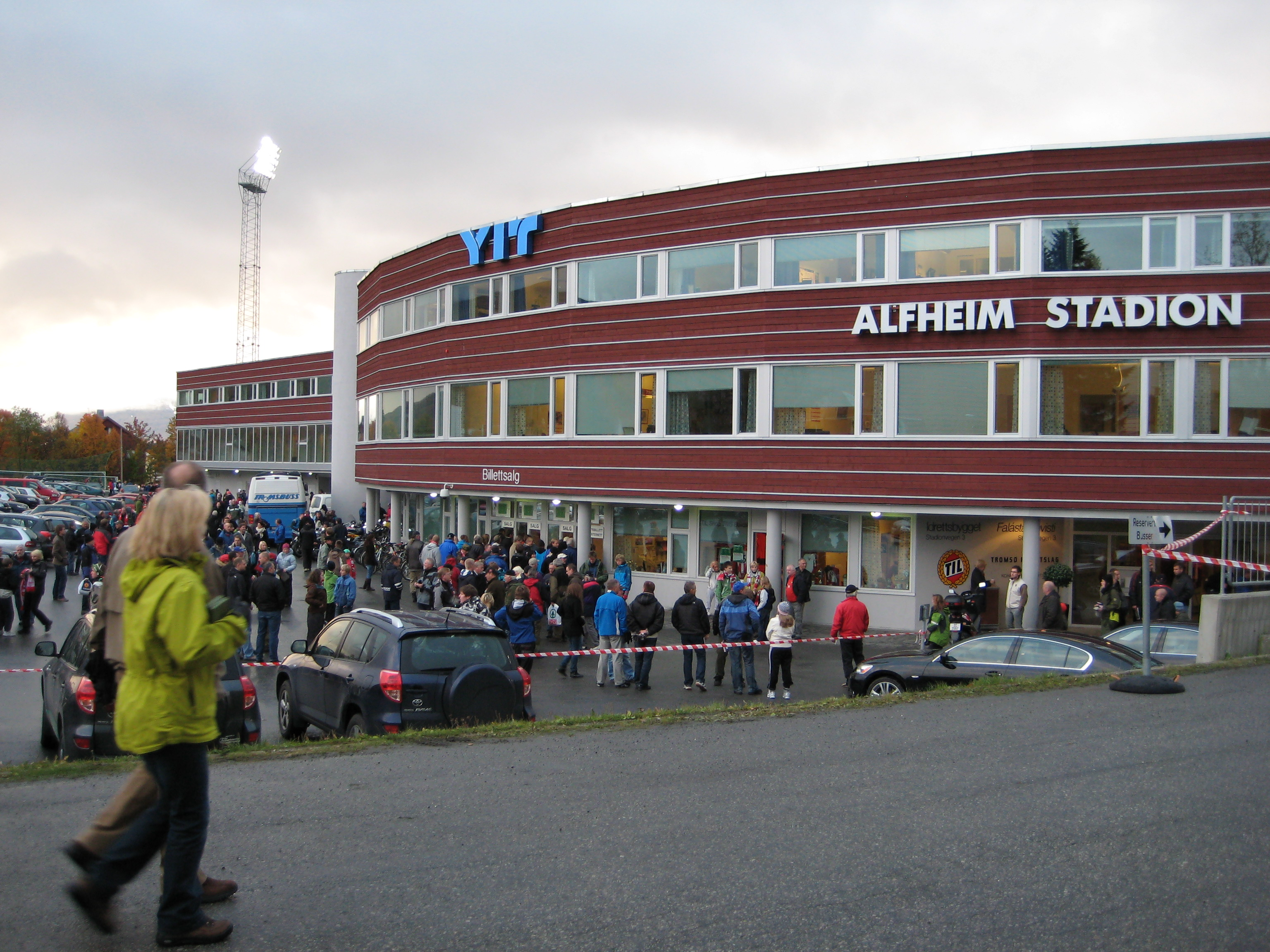 Alfheim stadium facade